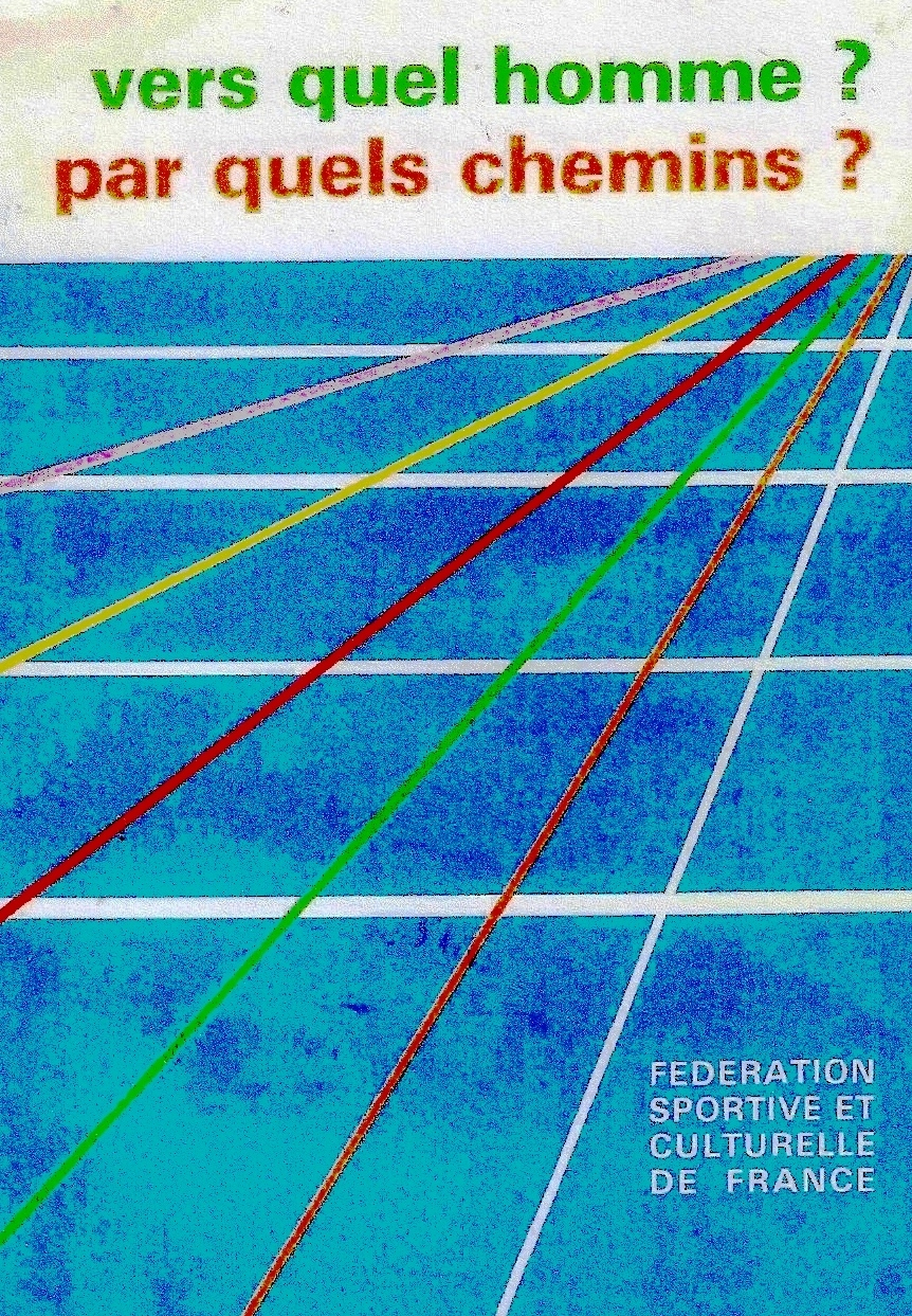 Couverture de l'ouvrage de référence de la Fédération sportive et culturelle dee France,, publié à compte d'auteur